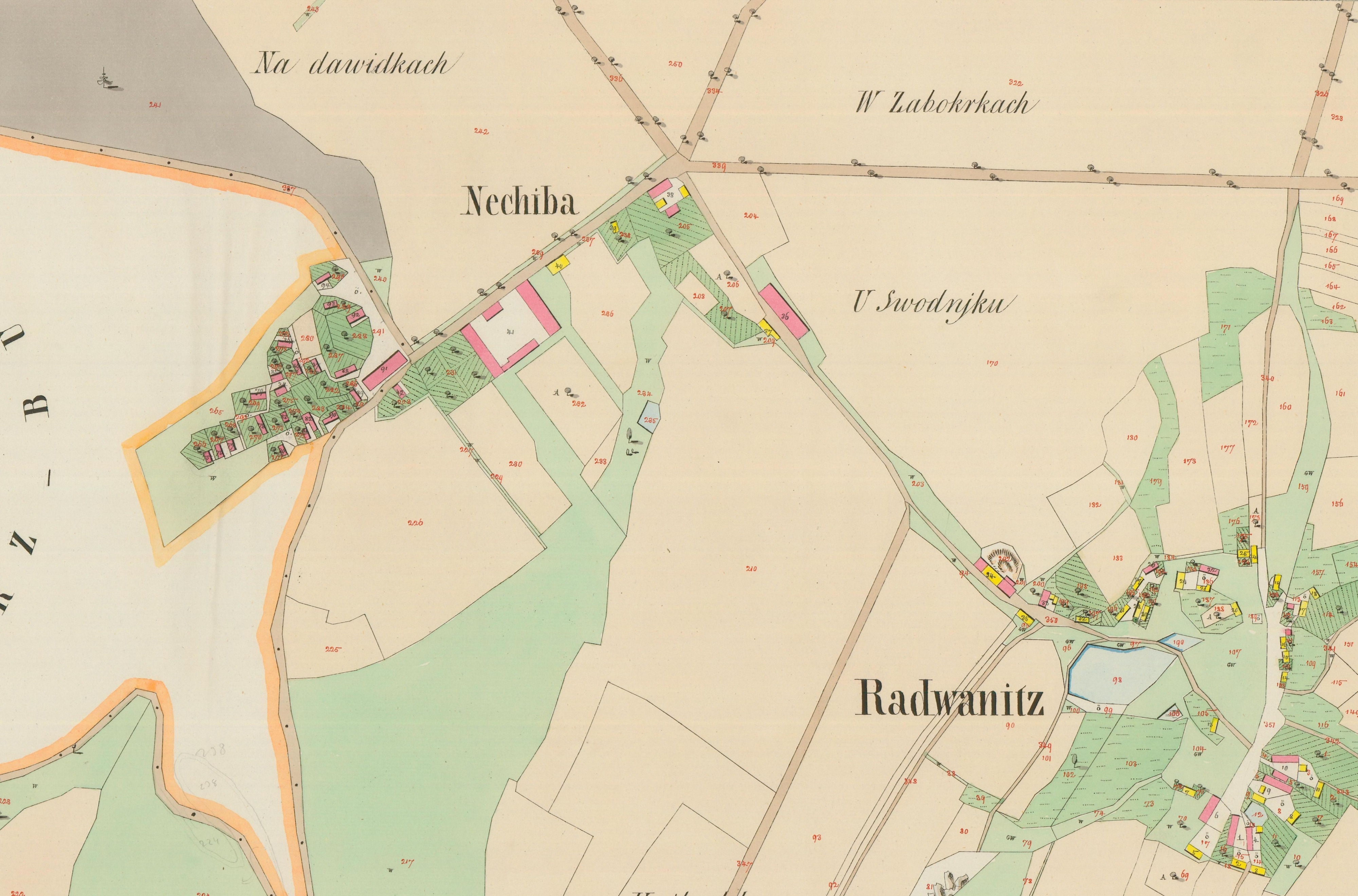 Nechyba (část obce Úžice v okrese Kutná Hora) na císařských otiscích mapy stabilního katastru